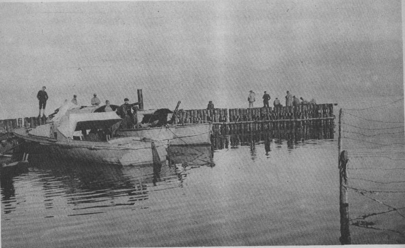 exttrait de la page 9.